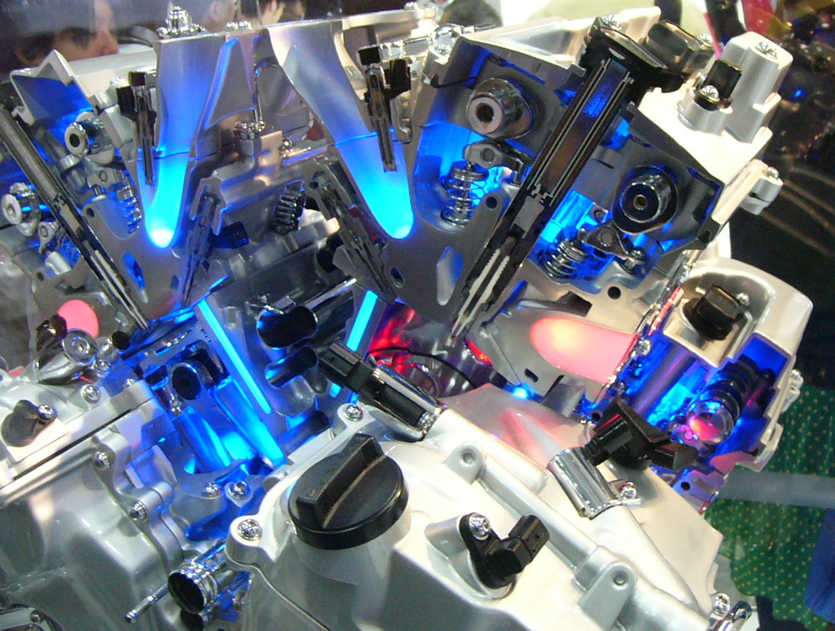 TOYOTA 2GR-FSE V6 3.5L D-4S Tokyo Motor show 2005